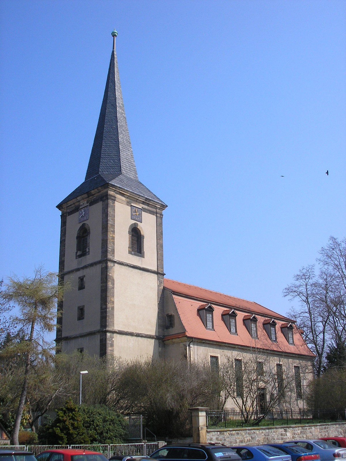 Die Kilianikirche in Erfurt-Gispersleben (Thüringen).